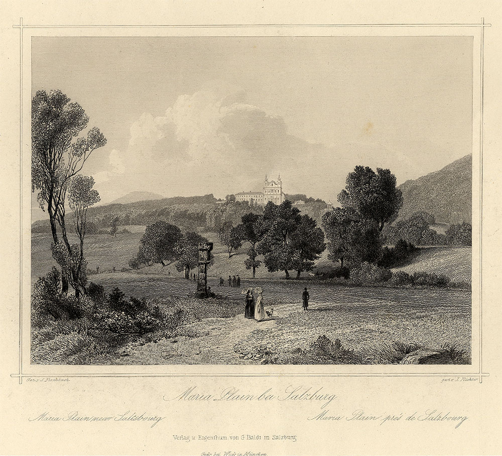 Stahlstich Maria Plain bei Salzburg, 1852. Das Bild zeigt die Anlage Maria Plain aus einer Ansicht noch vom Gebiet des heutigen Salzburger Stadtteils Itzling. Zu sehen ist auch eine der Geheimnissäulen auf dem Weg nach Maria Plain.